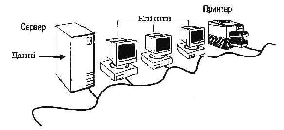 мережа на основі сервера